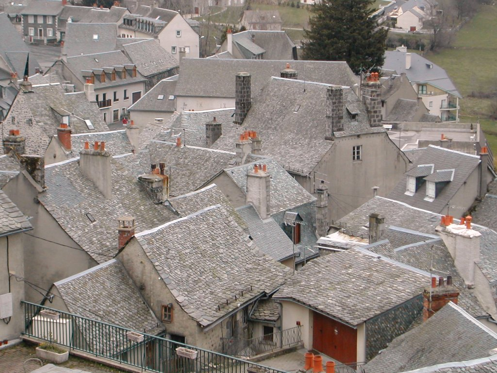 Les toits en lauzes de Laguiole (Aveyron, France)